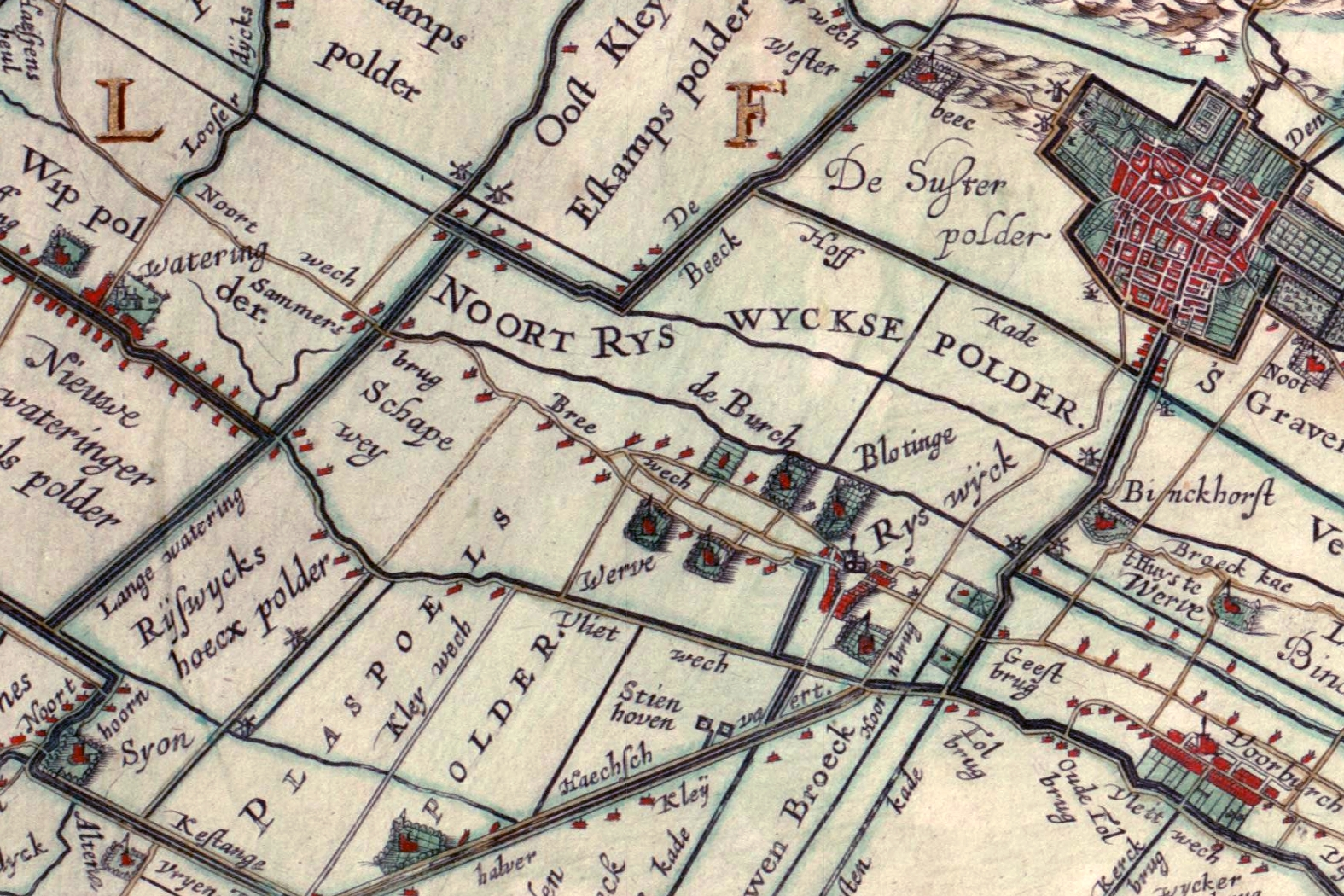 Rijswijk, Netherlands